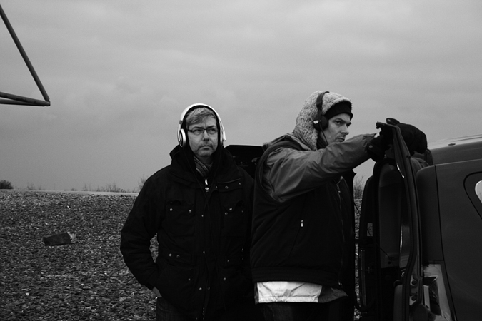 M+M (rechts Marc Weis, links Martin De Mattia)